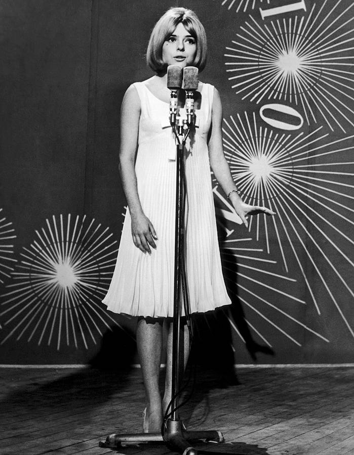 Napoli, Centro di Produzione RAI, 20 marzo 1965. La cantante francese France Gall, nell'occasione in gara per il Lussemburgo, esegue la canzone Poupée de cire, poupée de son durante il vittorioso Eurovision Song Contest 1965.